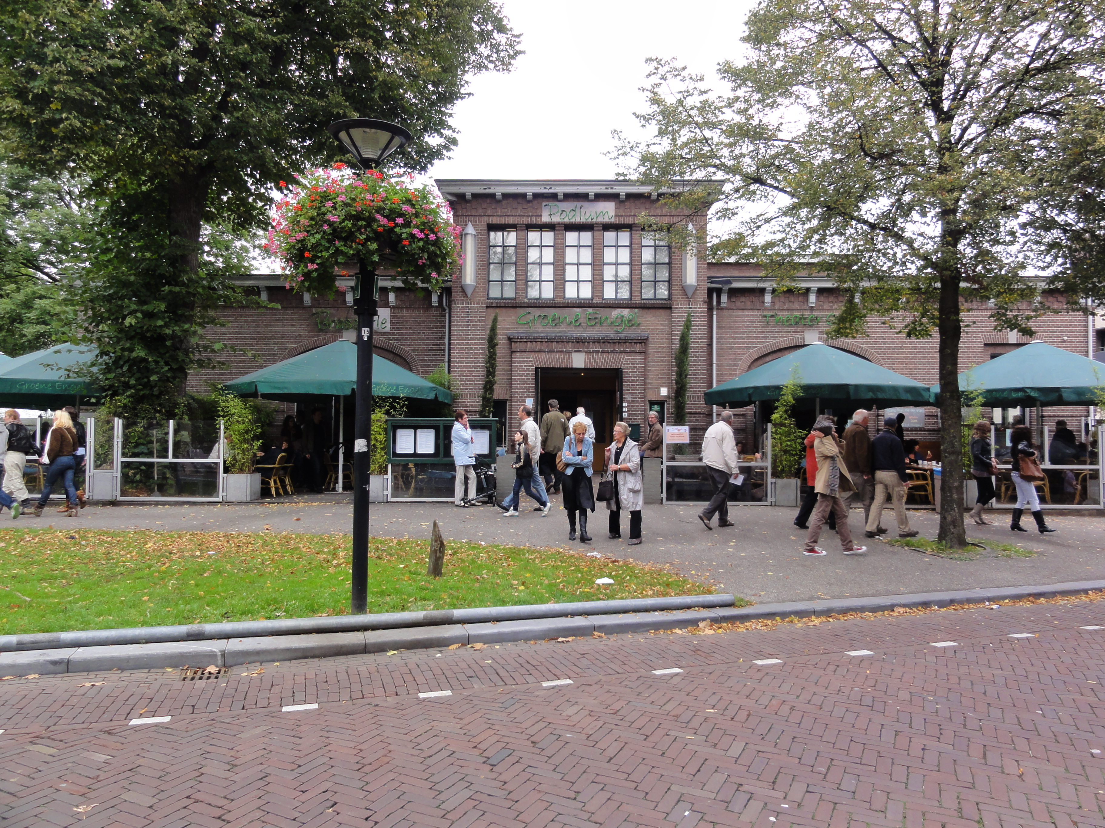 Oss Rijksmonument 516599 voormalige Jurgensfabriek, nu cultureel centrum annex café De Groene Engel, Kruisstraat 15. 07″ N, 5° 31′ 40.27″ E Object location51° 46′ 02.57″ N, 5° 31′ 19.47″ E